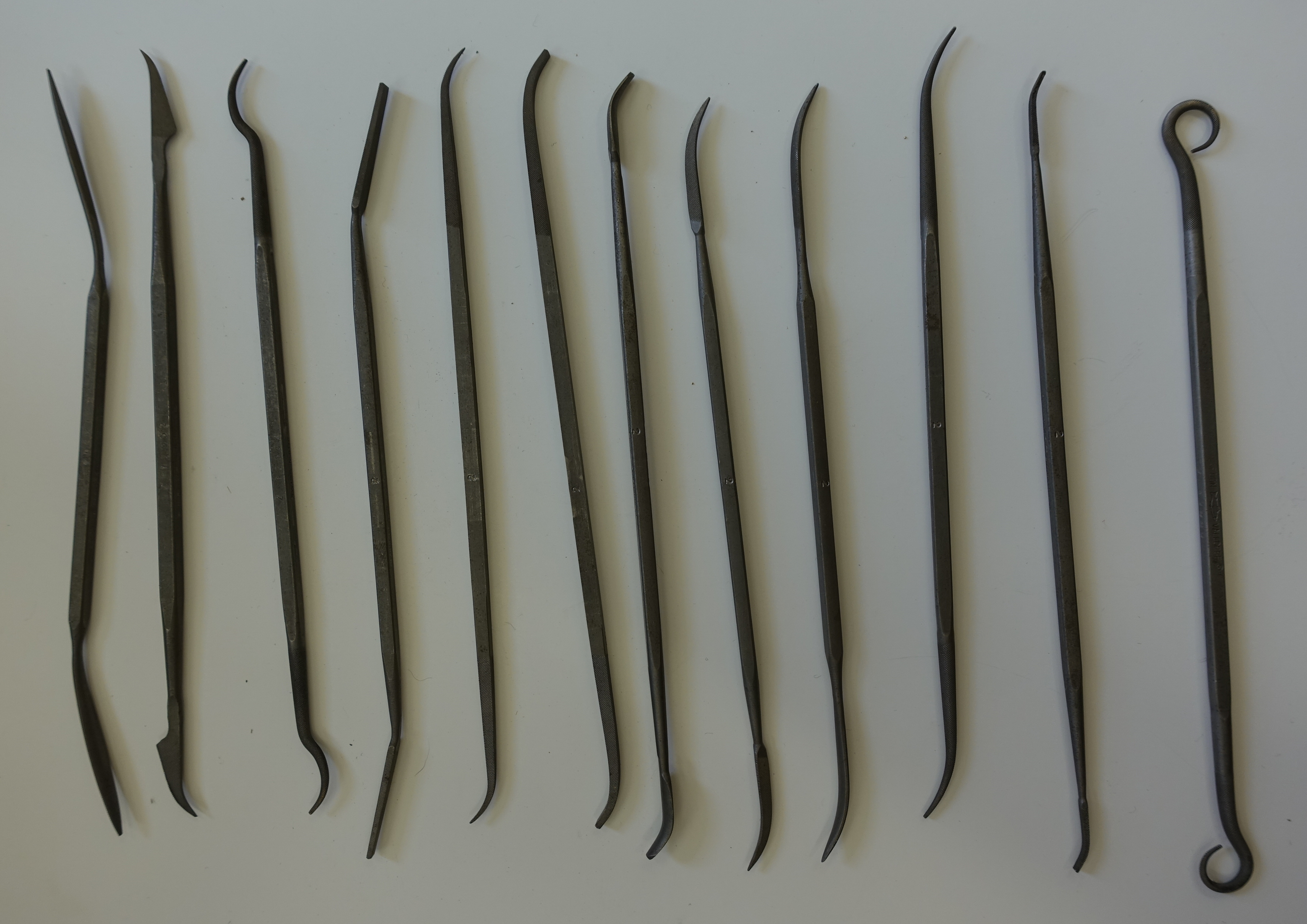 rifloirs